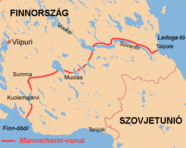 A térkép Finnország Téli háború alatti fő védelmi vonalát, a Mannerheim-vonalat ábrázolja